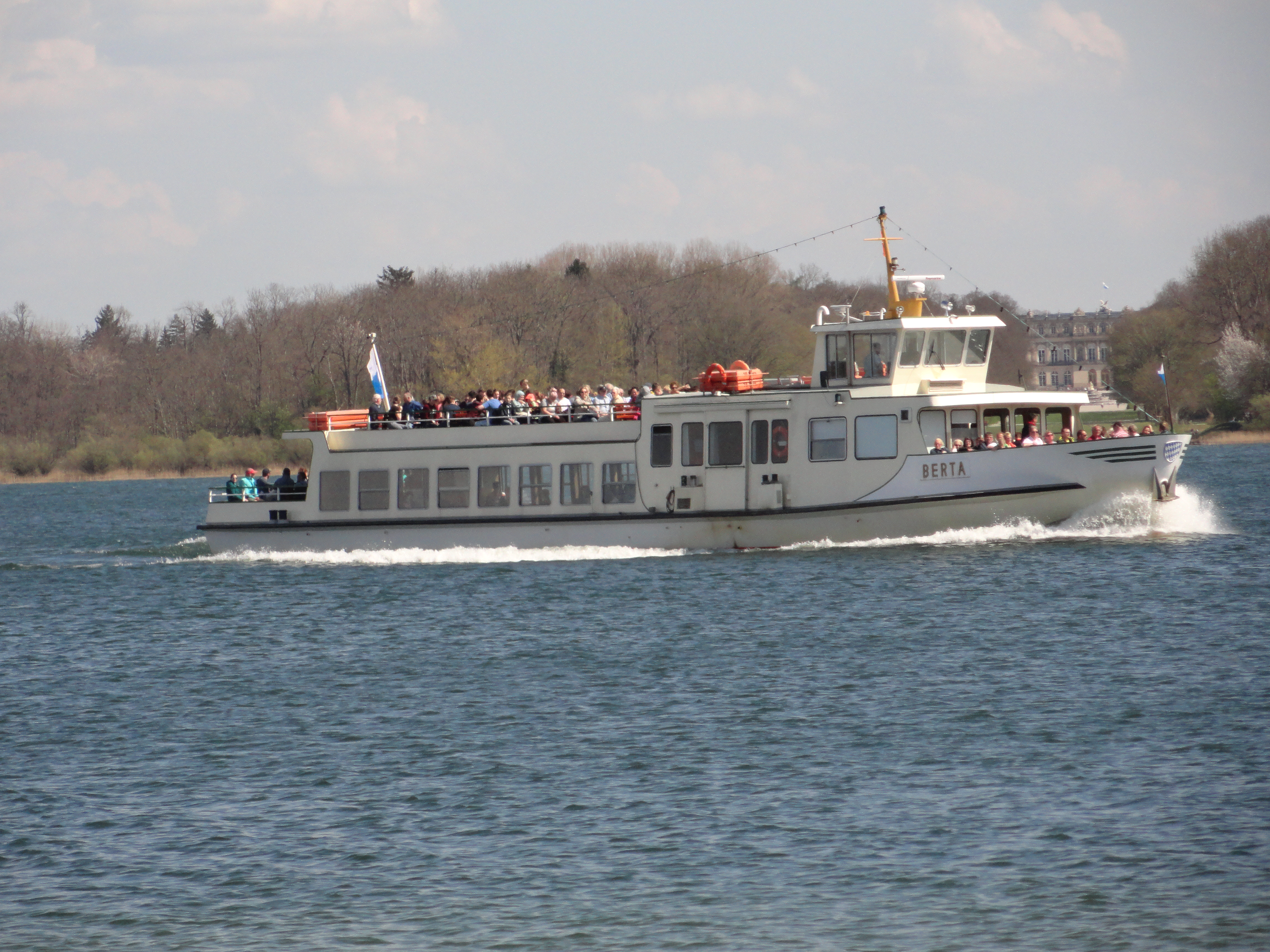 Das Fahrgastschiff Berta bei der Anfahrt zur Anlegestelle in Prien am Chiemsee